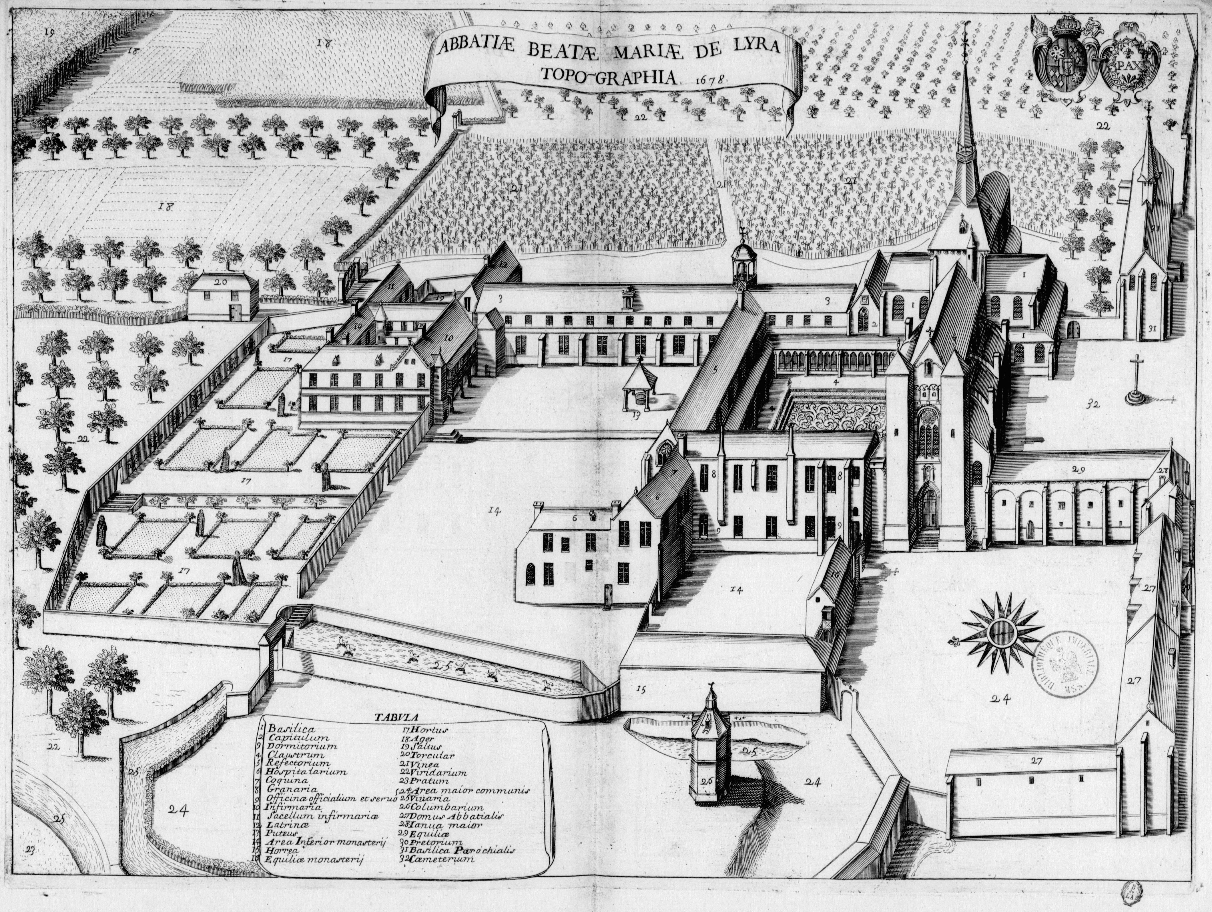 Planche gravée du 17ème siècle représentant l'abbaye Notre-Dame de Lyre, dans le livre Monasticon Gallicanum.